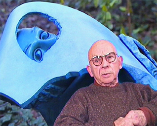 Portrait de Jean-Robert Ipoustéguy